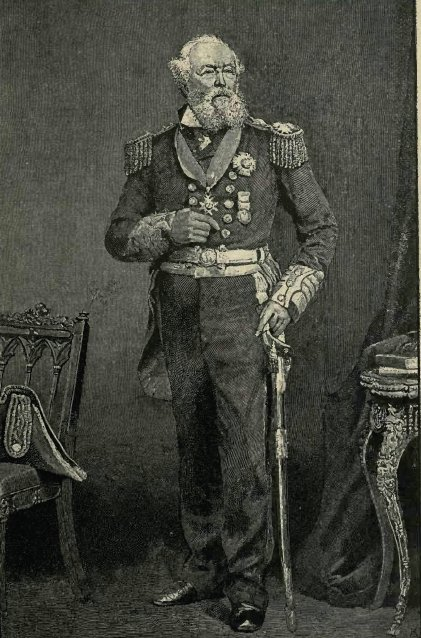 Provo Wallis